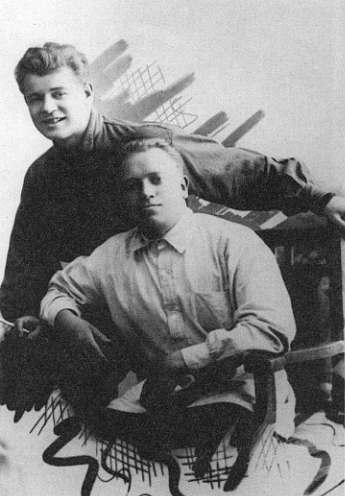 С. А. Есенин, П. И. Чагин. 1924 г., сентябрь. Баку.